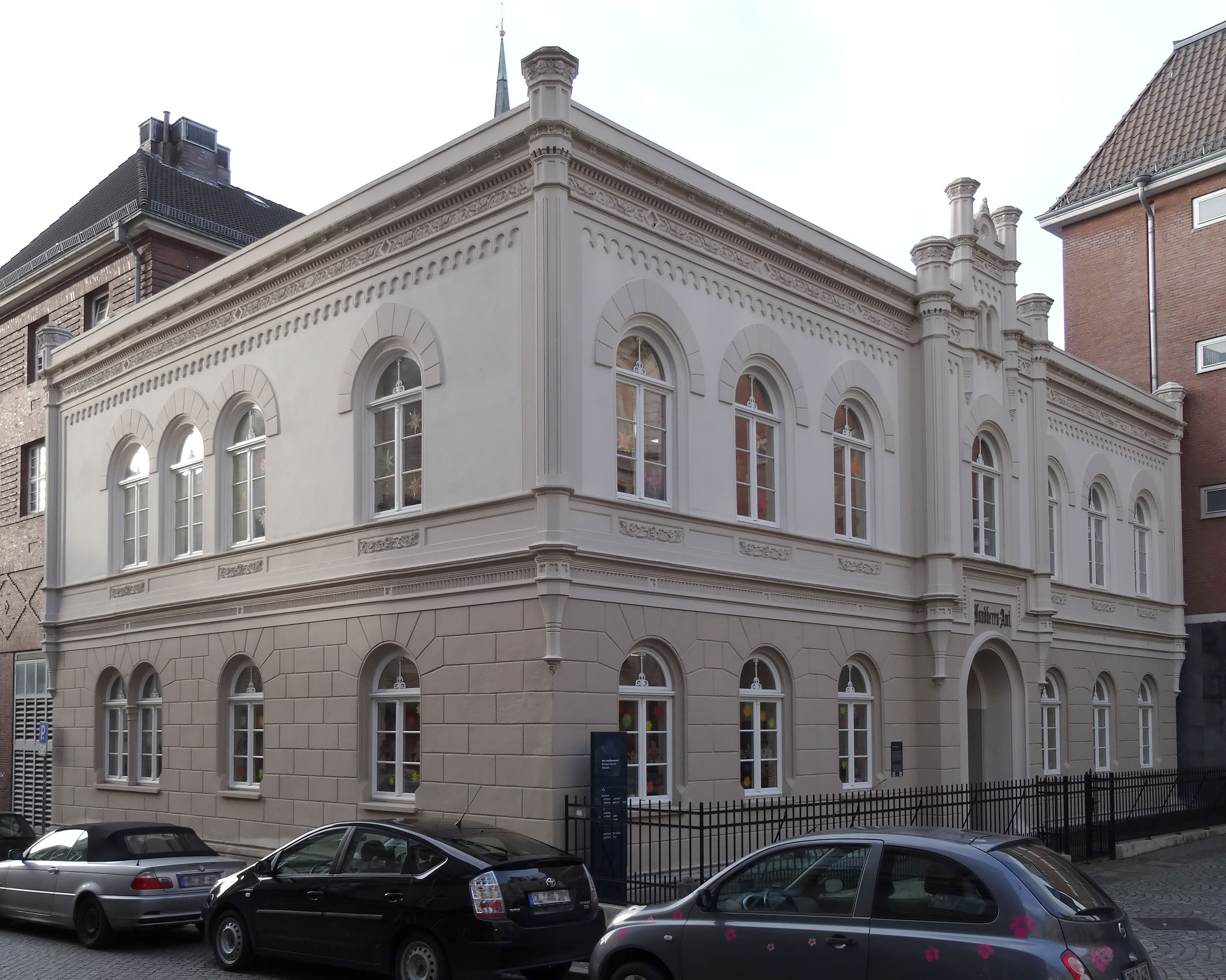 Landherrn-Amt im Schnoorviertel. Bremen, Dechanatstraße/Ecke Am Landherrnamt. 1856/57 nach Plänen des Bremer Baudirektors Alexander Schröder gebaut Das abgebildete Objekt ist ein geschütztes Kulturdenkmal in der Freien Hansestadt Bremen, mit der Nr. 0292 beim Landesamt für Denkmalpflege registriert.